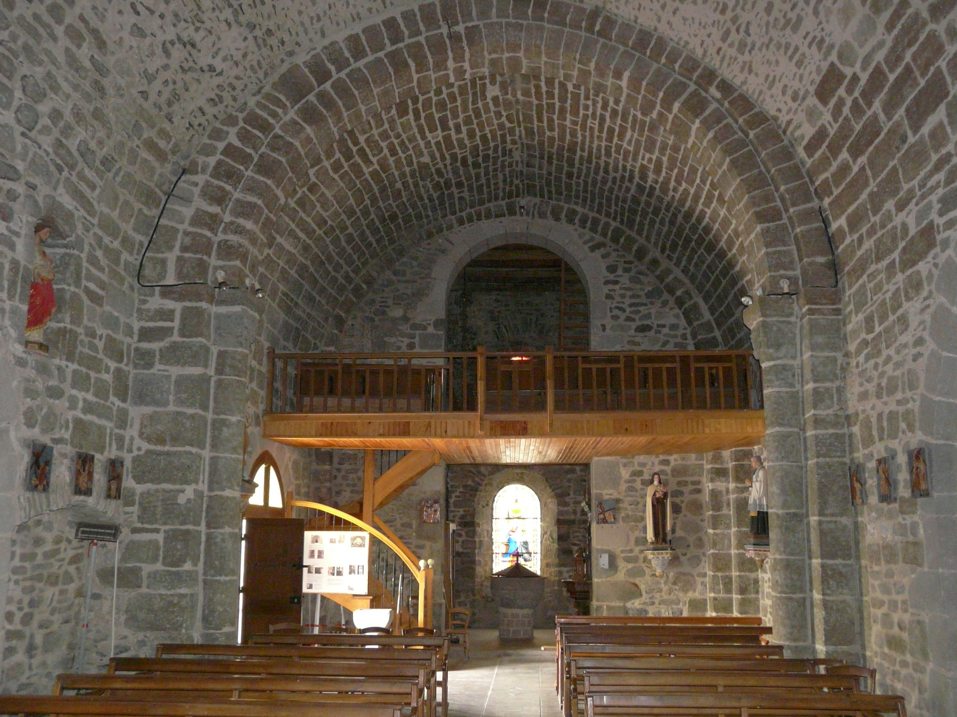 La nef et la tribune de l'église, Lugarde, Cantal, France.